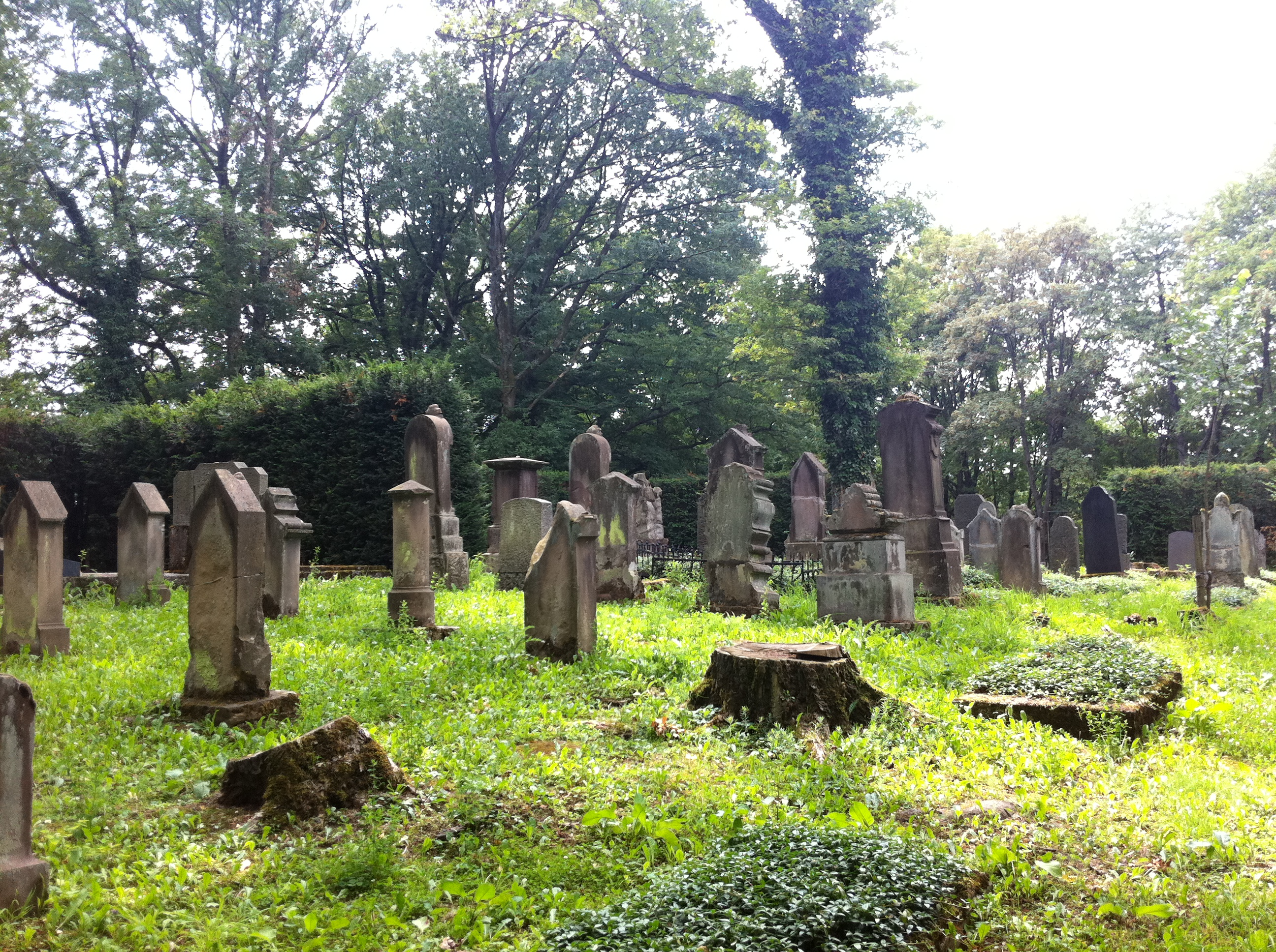 Jüdischer Friedhof Tholey im Saarland